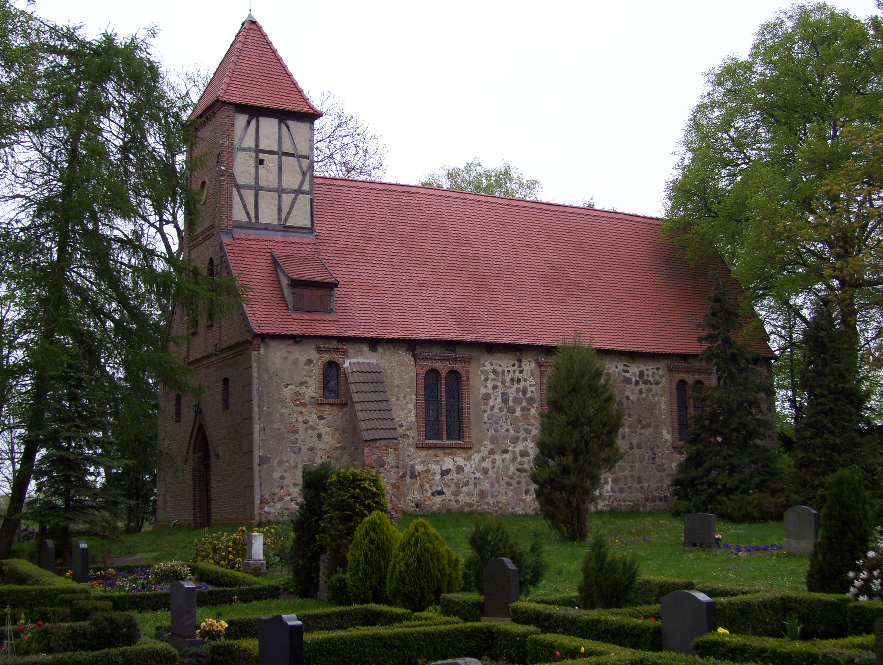 Südseite der Kirche in Sanzkow, Gemeinde Siedenbrünzow, Landkreis Demmin